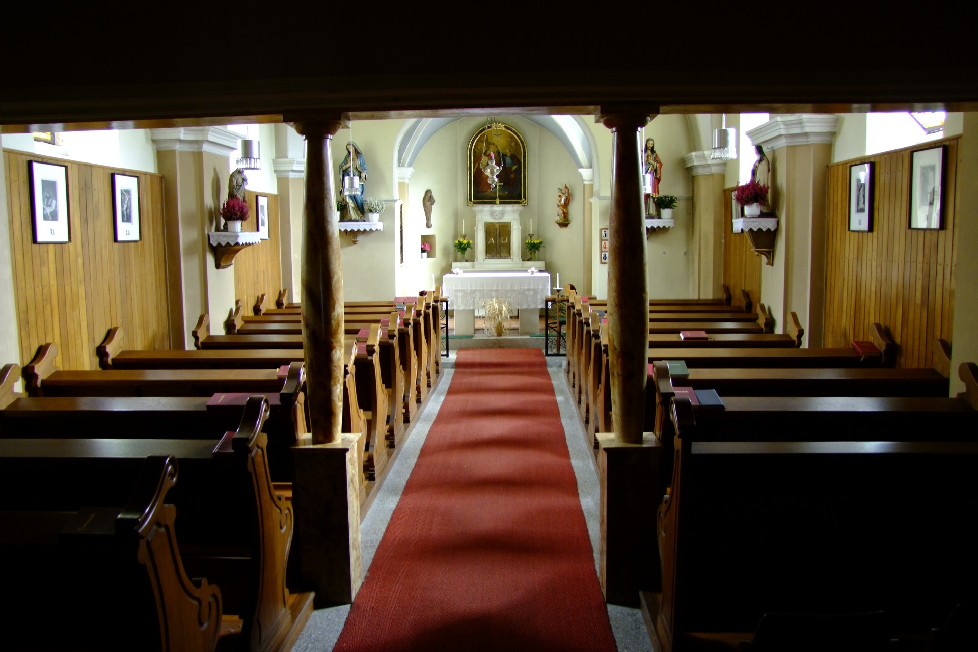 Kath. Filialkirche hl. Rosalia